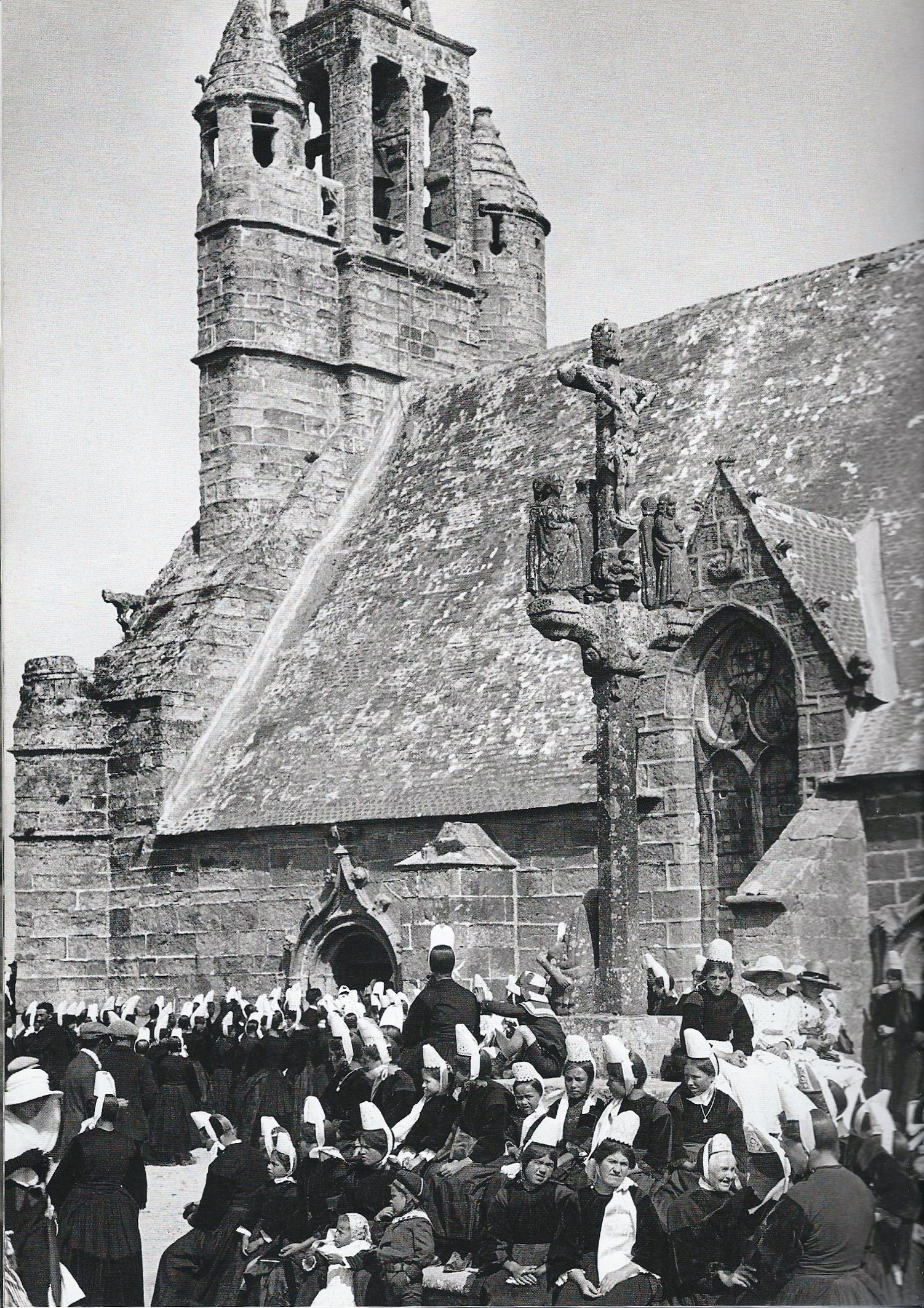 Le pardon de Notre-Dame de la Joie à Penmarch vers 1930 (photographie de Jacques de Thézac)